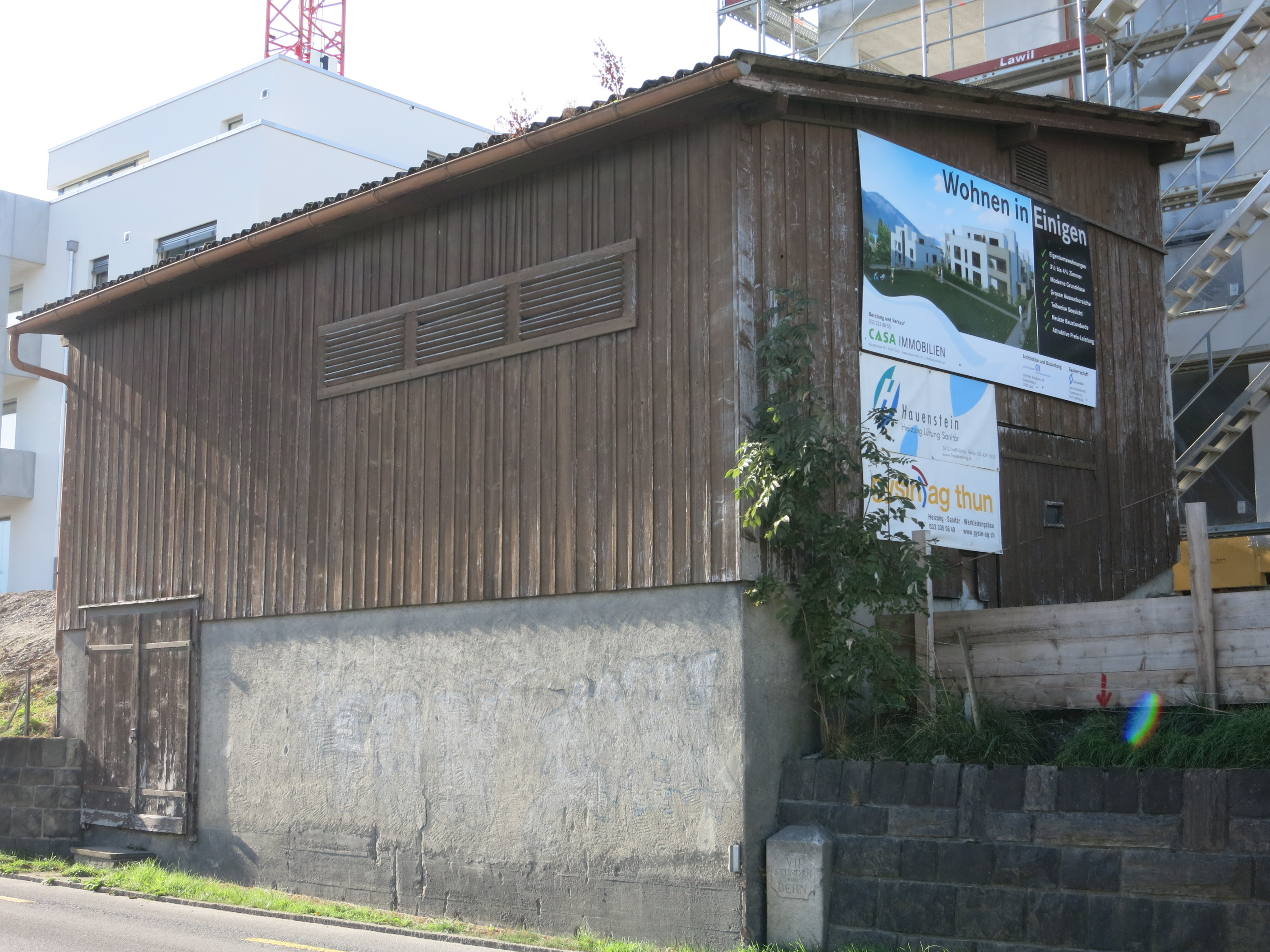 Sperrstelle Einigen, Spiez BE, Schweiz